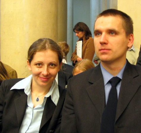 Monika and Bartosz Soćko, Warsaw